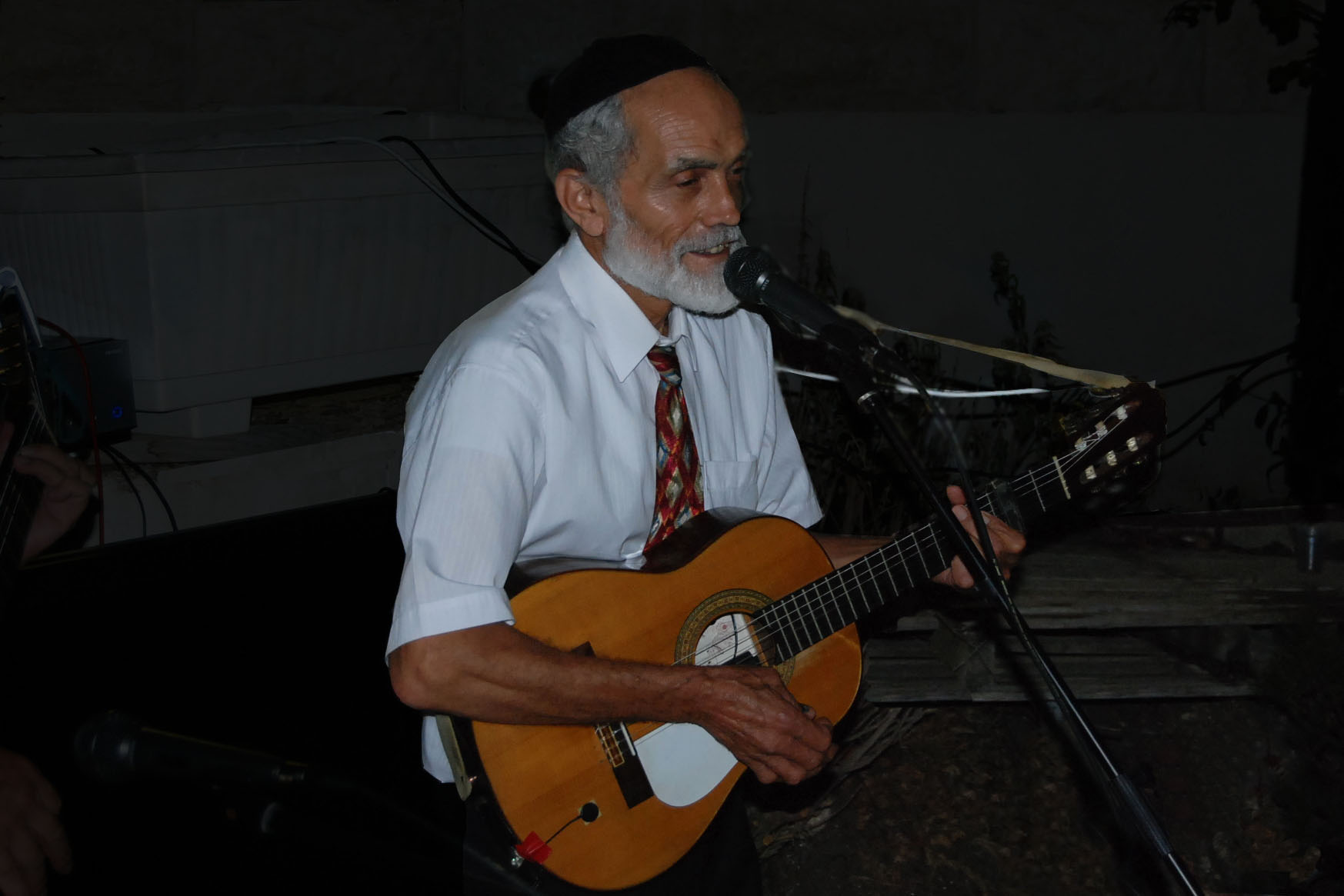 ניסים מנחם מנגן בגיטרה